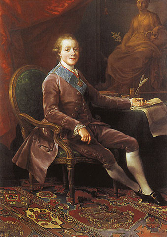 Портреты Великой княгини Марии Федоровны и Великого князя Павла Петровича. И. Пульман, 1782 – 1787 гг., ( с оригинала П. Батони, 1782 г.)